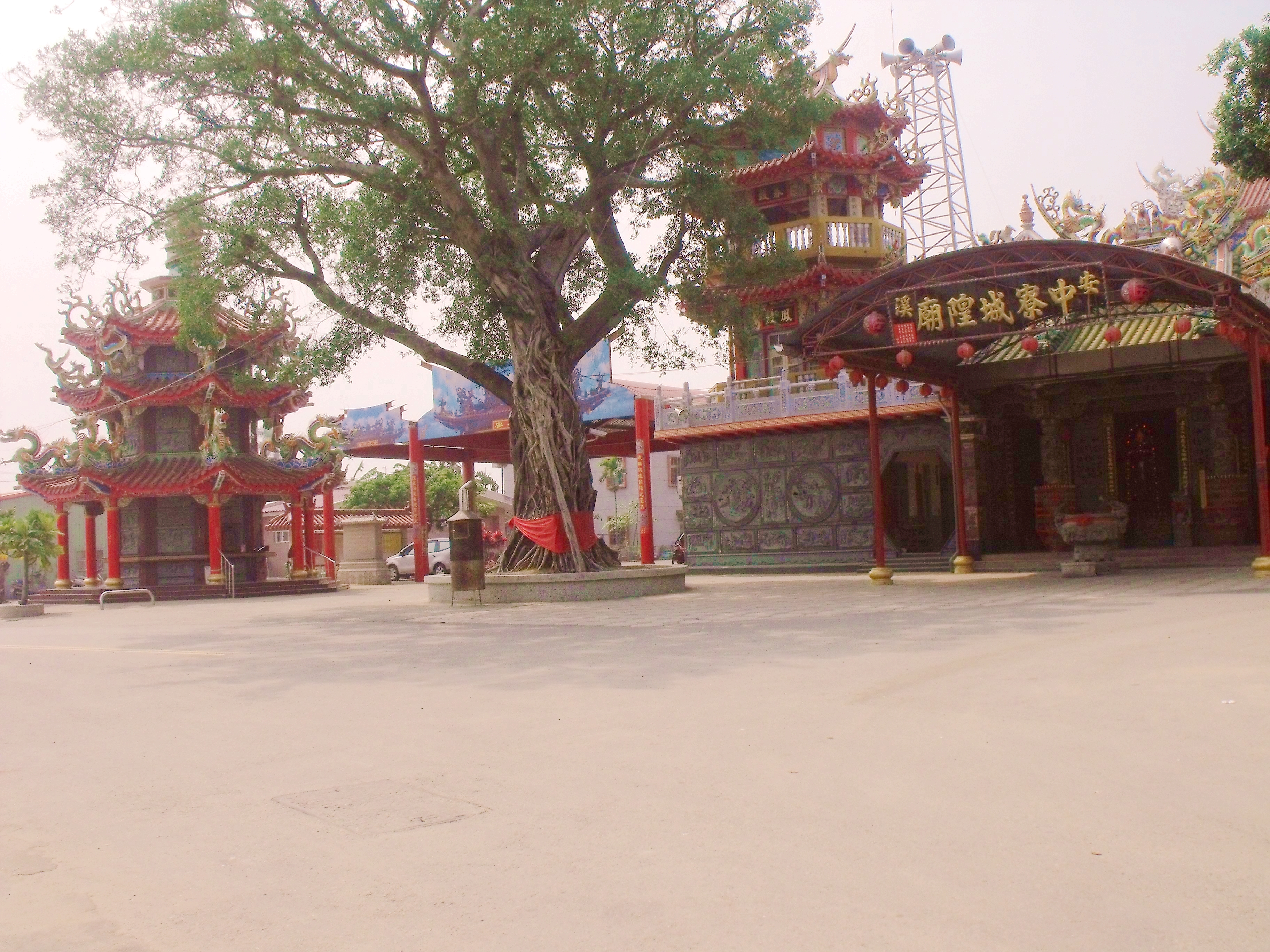 鹿草中寮安溪城隍廟